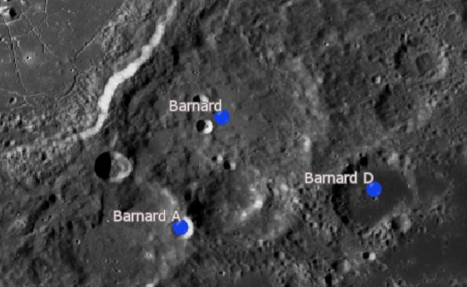 Cráter lunar Barnard. Cráteres satélite. (Imagen LRO)